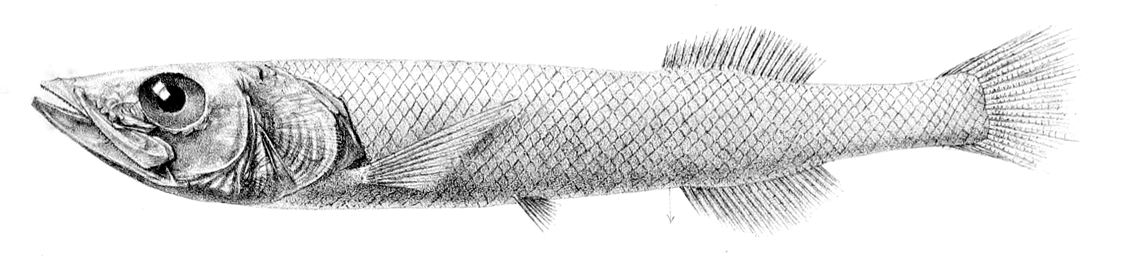 Talismania homoptera